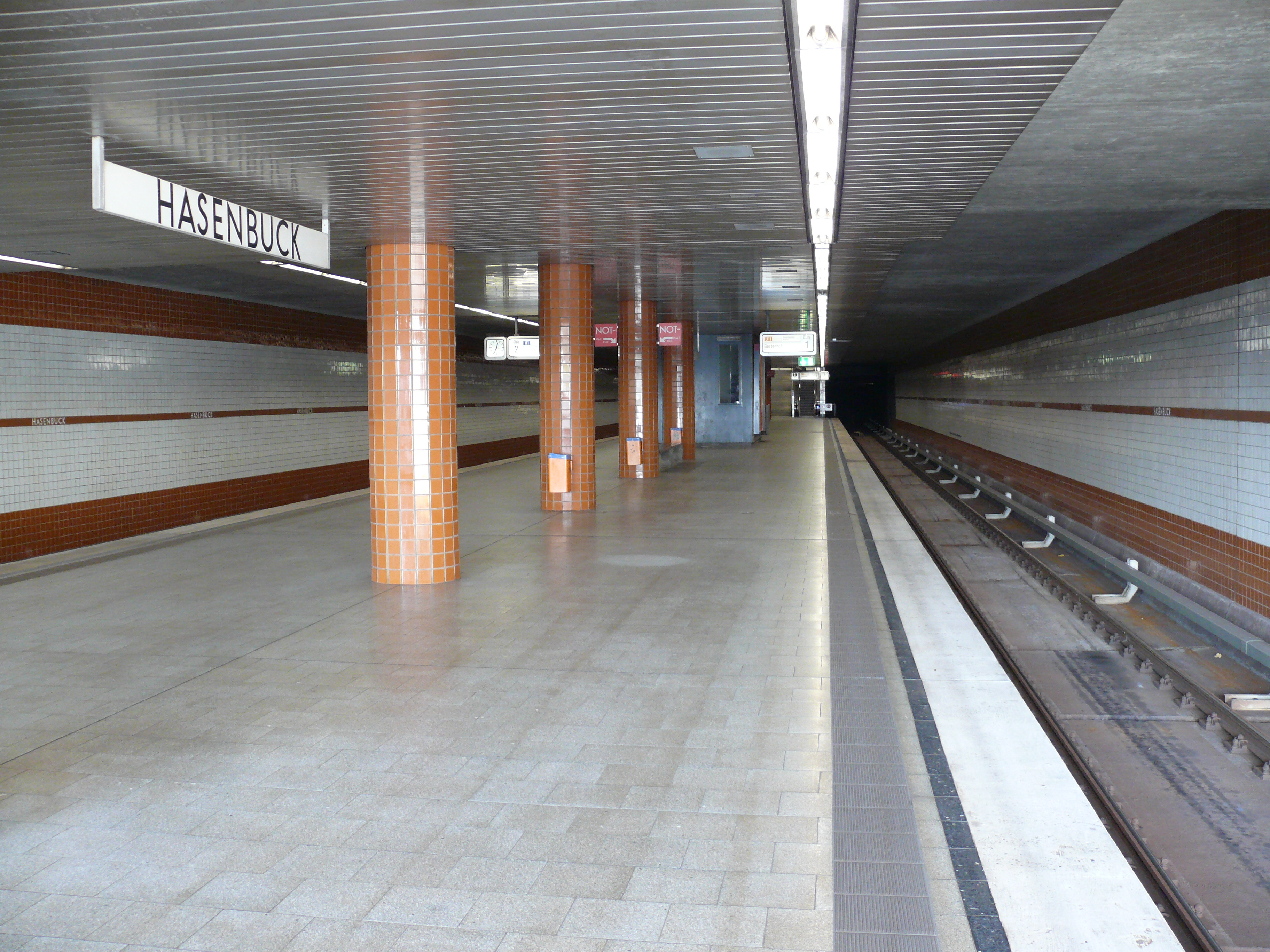 Bahnsteigebene am U-Bahnhof Hasenbuck in Nürnberg (Hier Gleis 1).